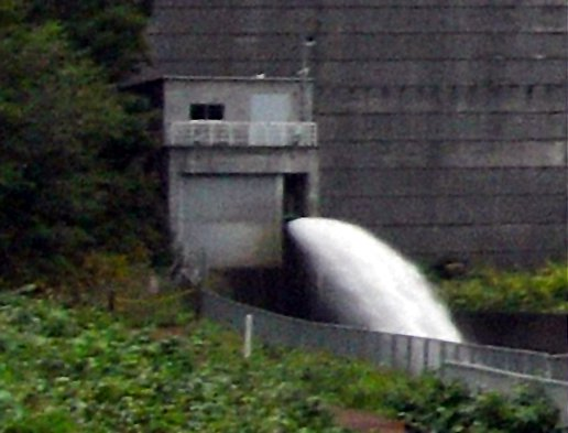 Dam